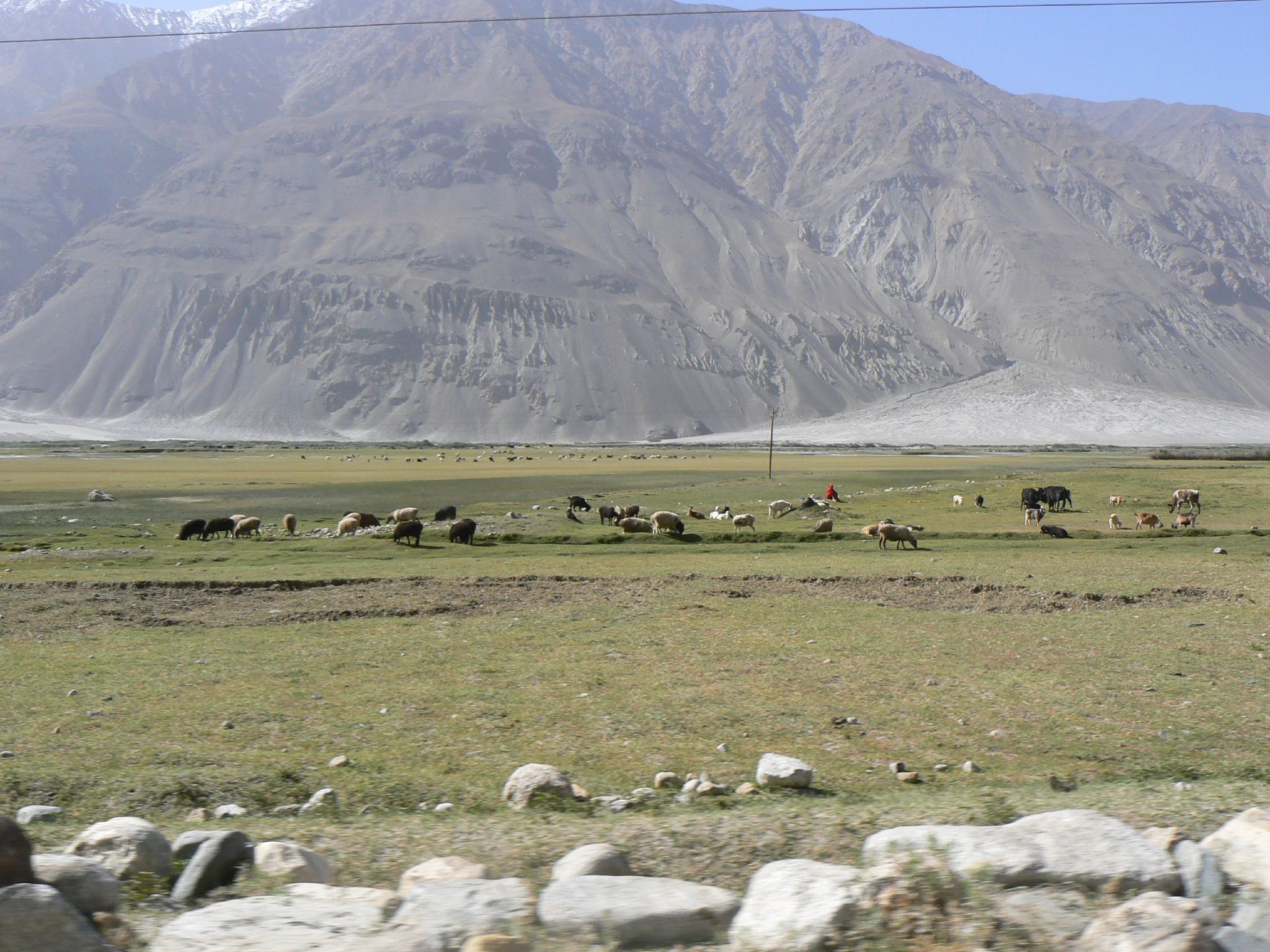 Wakhan Corridor between Pakistan and Tajikistan.